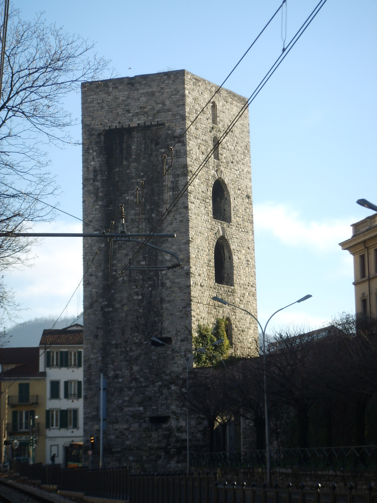 Como, torre medievale viale battisti